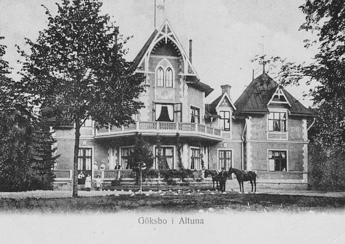 Revelsta fideikommiss, huvudbyggnaden "Göksbo"